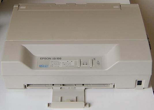 Epson Matrixdrucker LQ-100